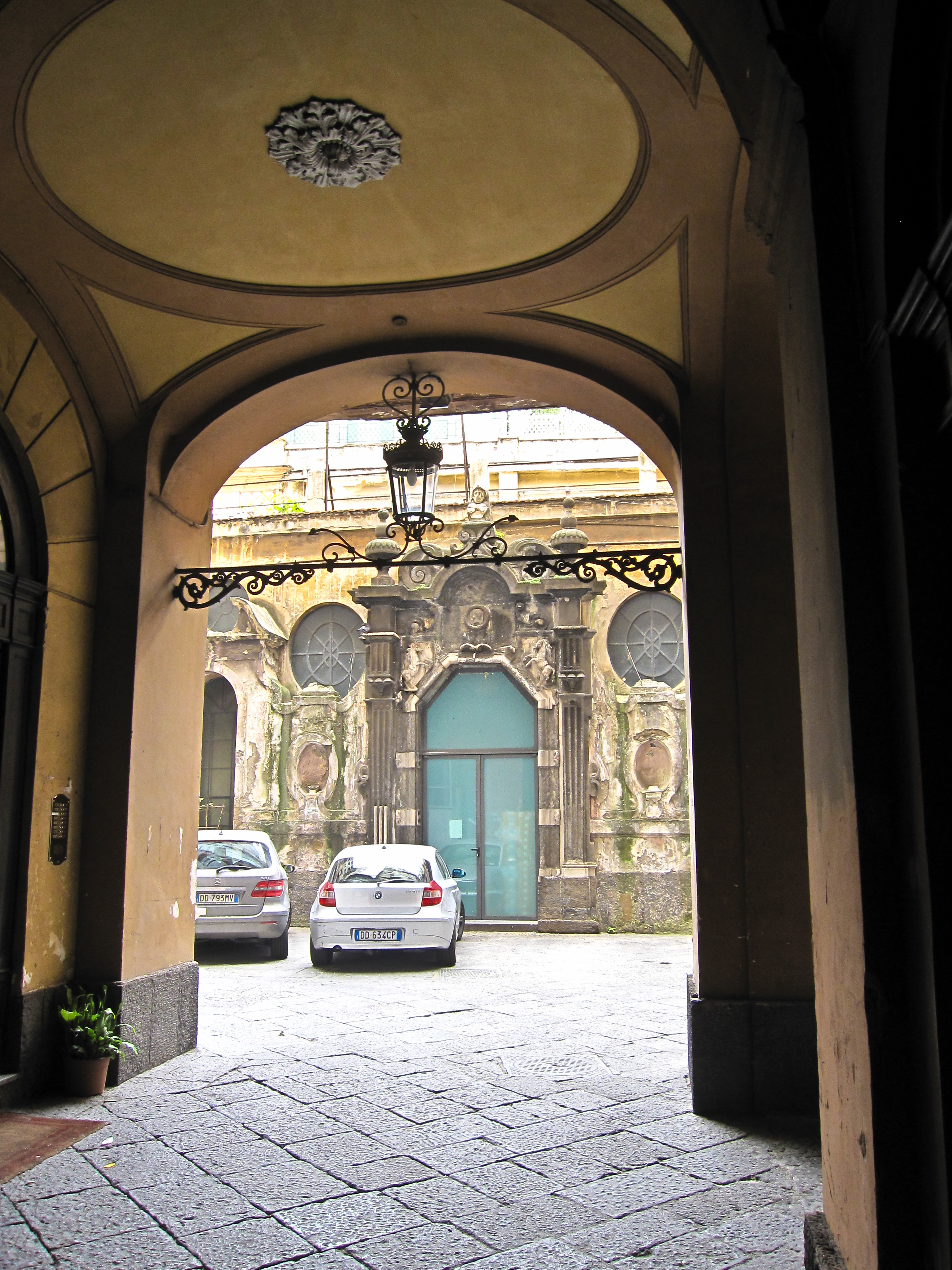 Già Carafa di Belvedere - L'androne con il portale barocco in marmo e piperno della fabbrica bassa del cortile Ubicato alla Riviera di Chiaia 264